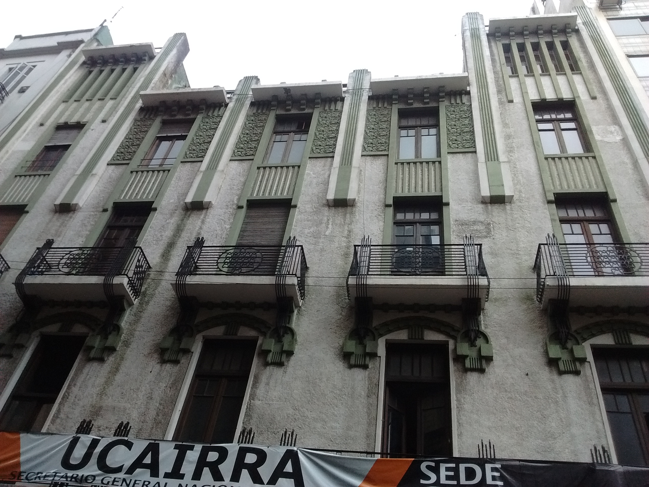 Edificio Chacabuco 78 (Buenos Aires) es una de las obras maestras del arquitecto Julián García Núñez, exponente del modernismo catalán en la Argentina.